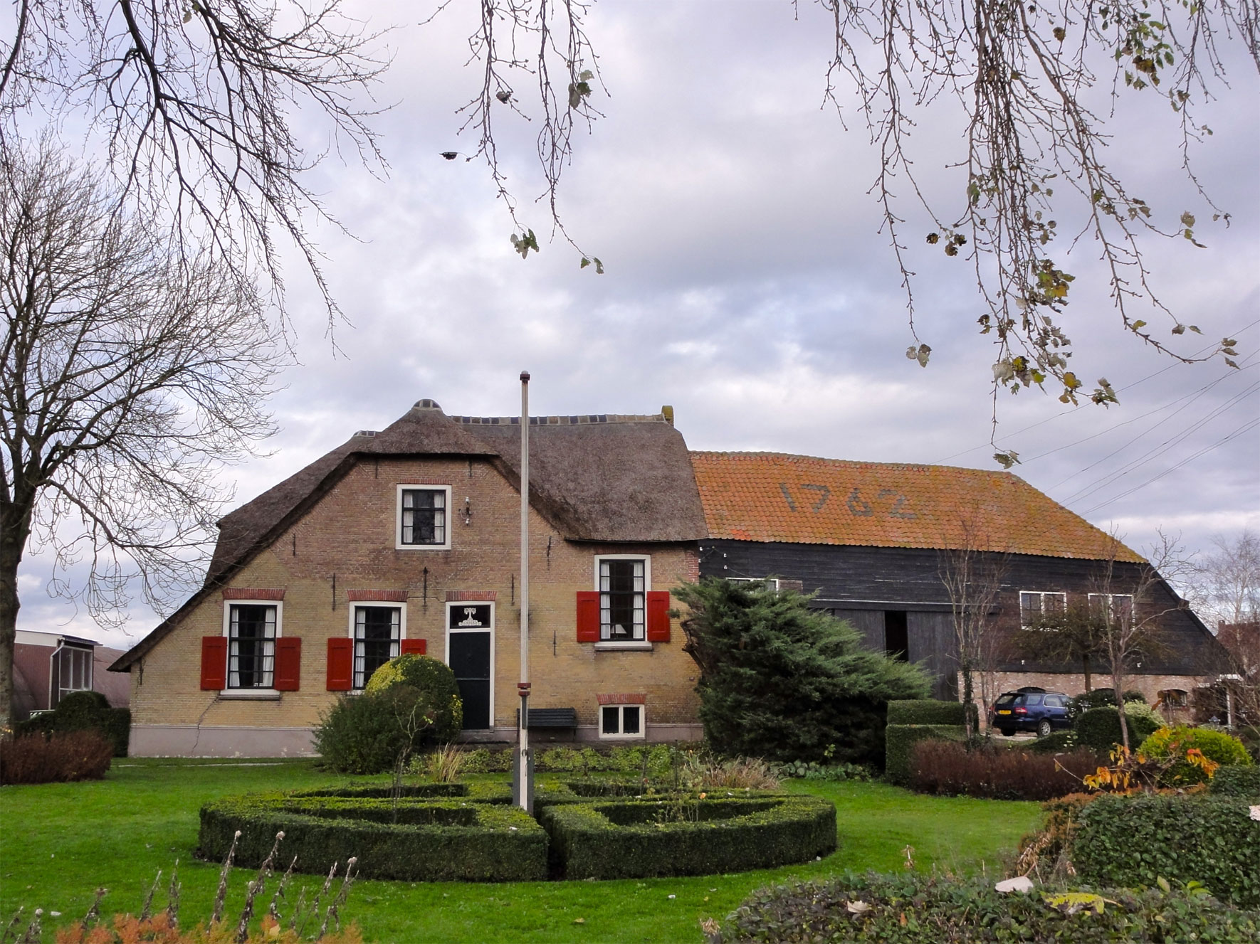 Bovenberg 70 Bergambacht